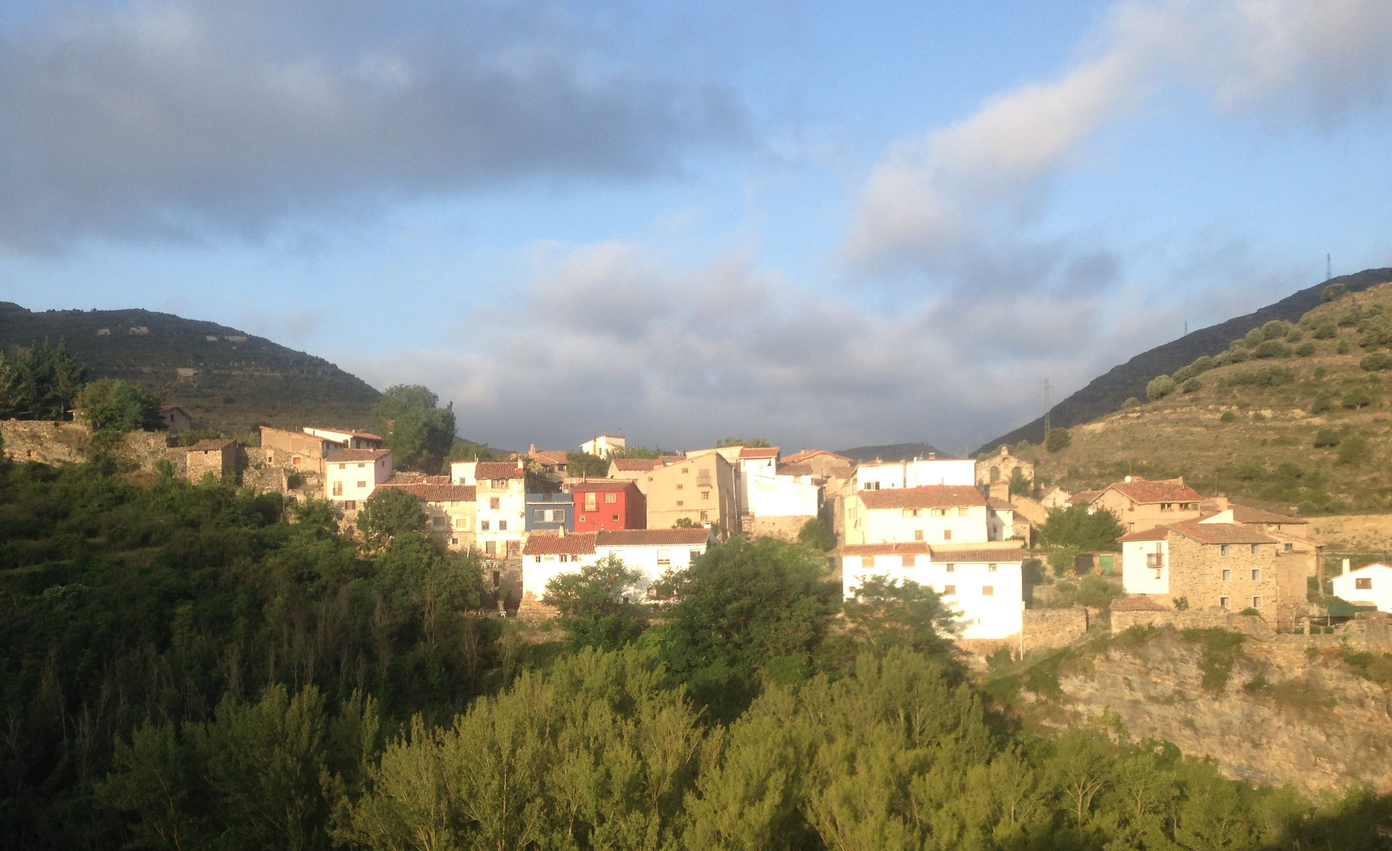 Vista general